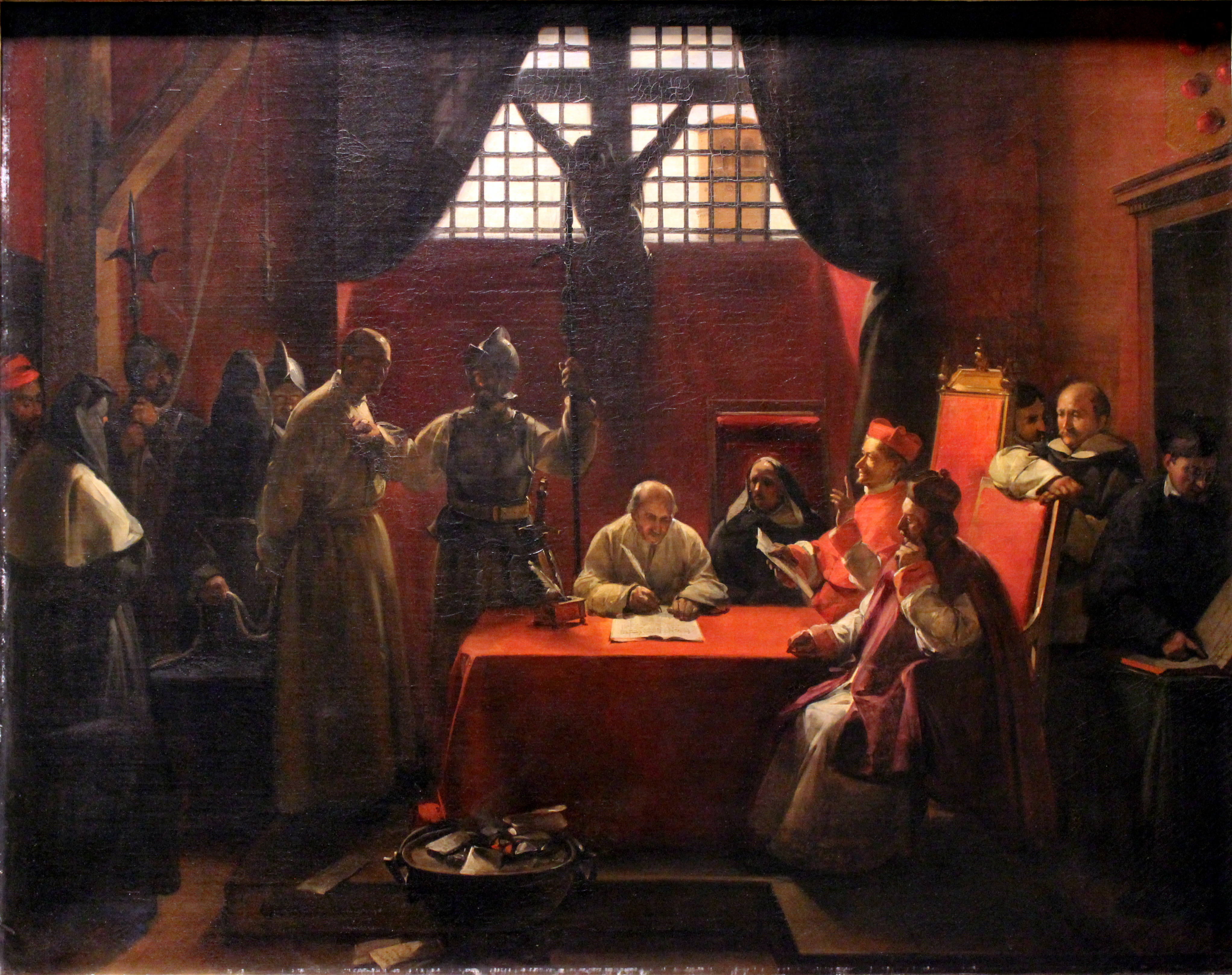 Interrogatoire de Savonarole, tableau de François Marius Granet en 1846, exposé au Musée des beaux-arts de Lyon en 2014.